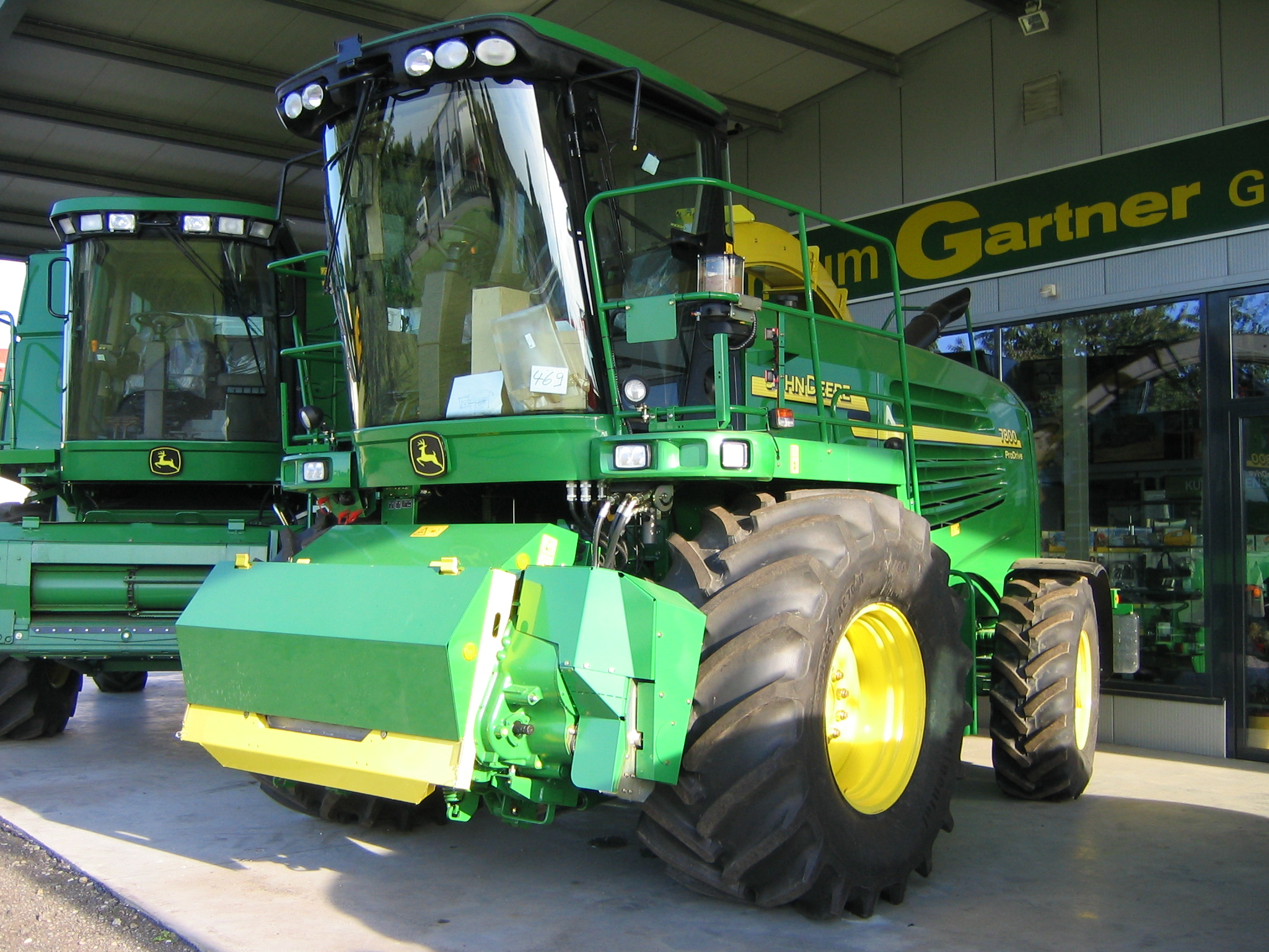 Feldhäcksler John Deere 7800, aufgenommen irgendwo zwischen Freiburg und Lahr